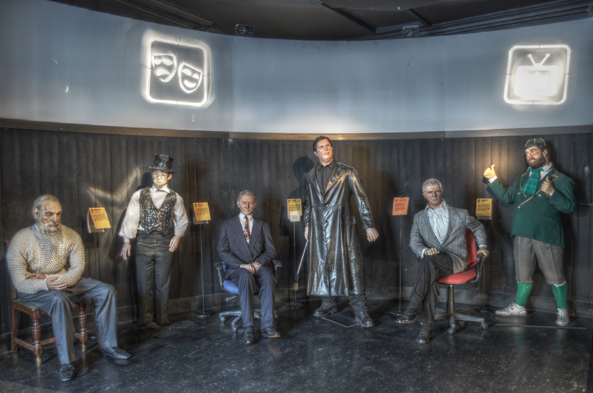 Camera: Nikon D5000 Luminance HDR, Mantiuk '06